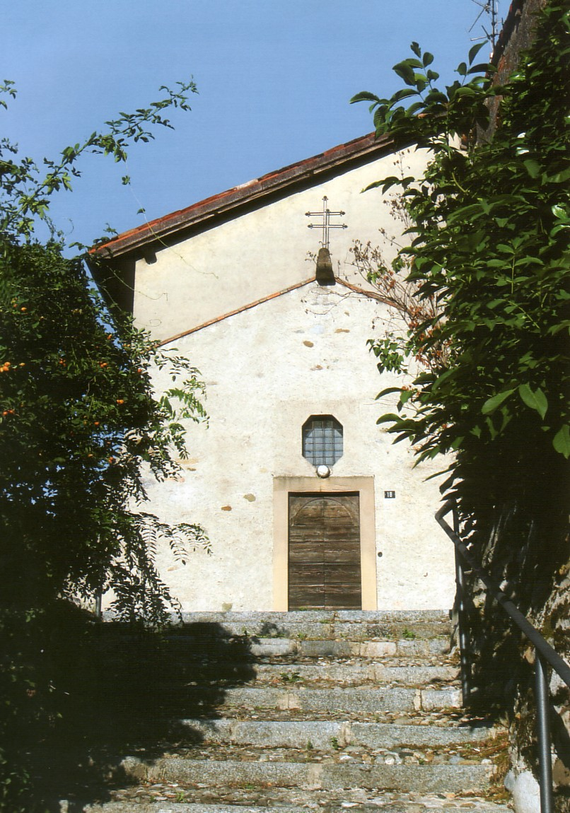 Chiesina di Santa Margherita, sita in via Santa Margherita a Casatenovo (LC)